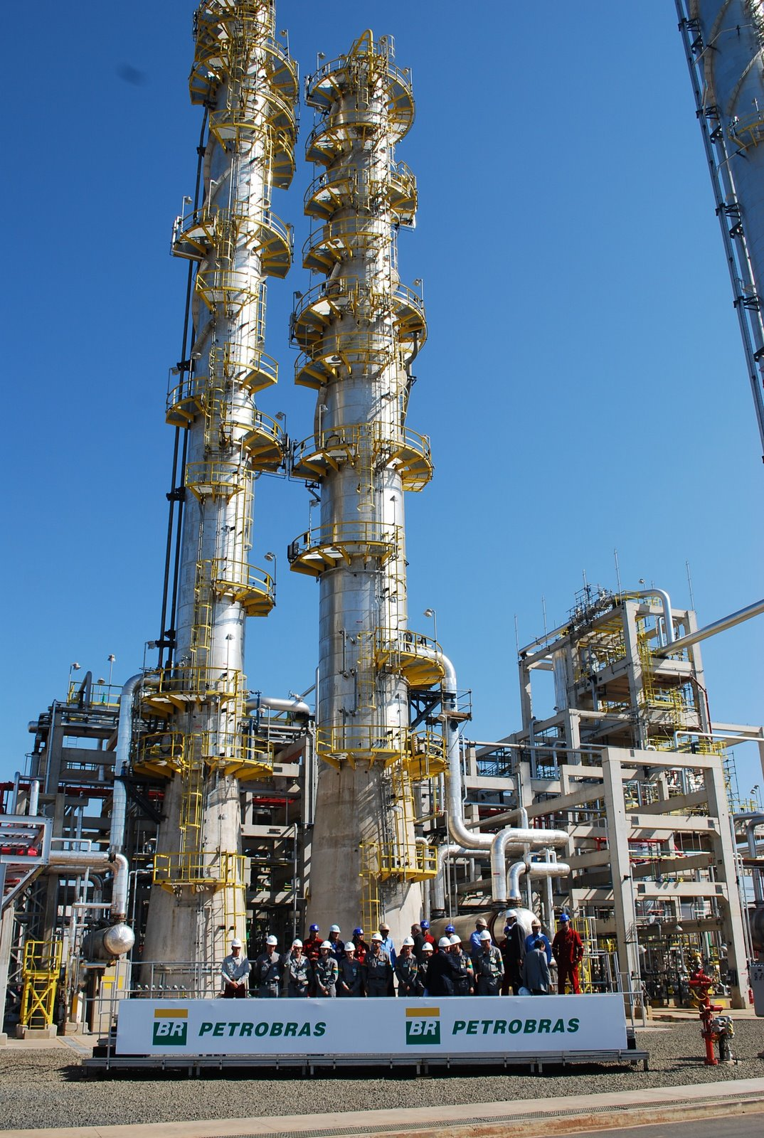 Unidade de propeno da Refinaria de Paulínia, SP, Brasil